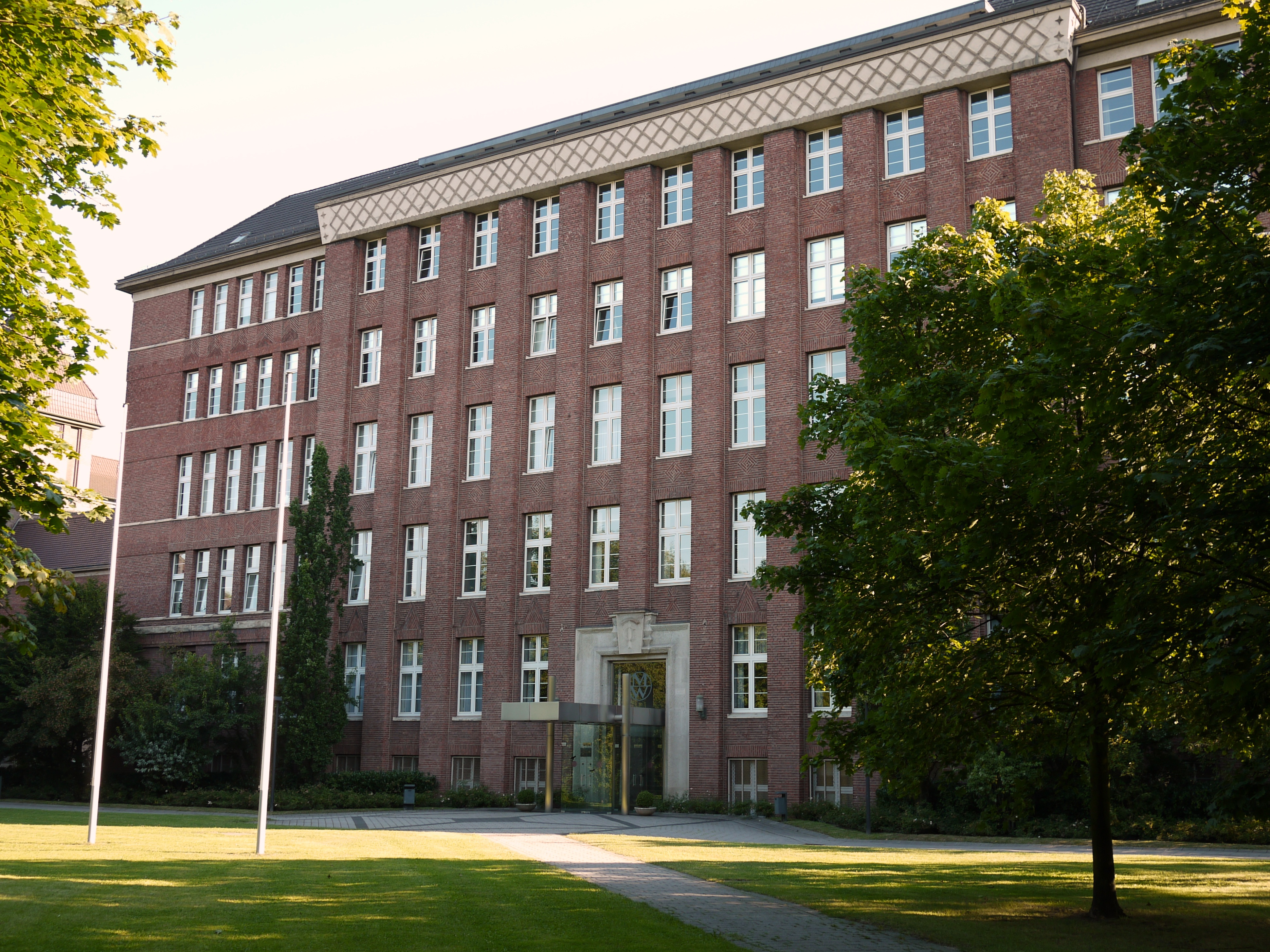 Verwaltungs Mannesmannröhren-Werke GmbH, Mülheim an der Ruhr